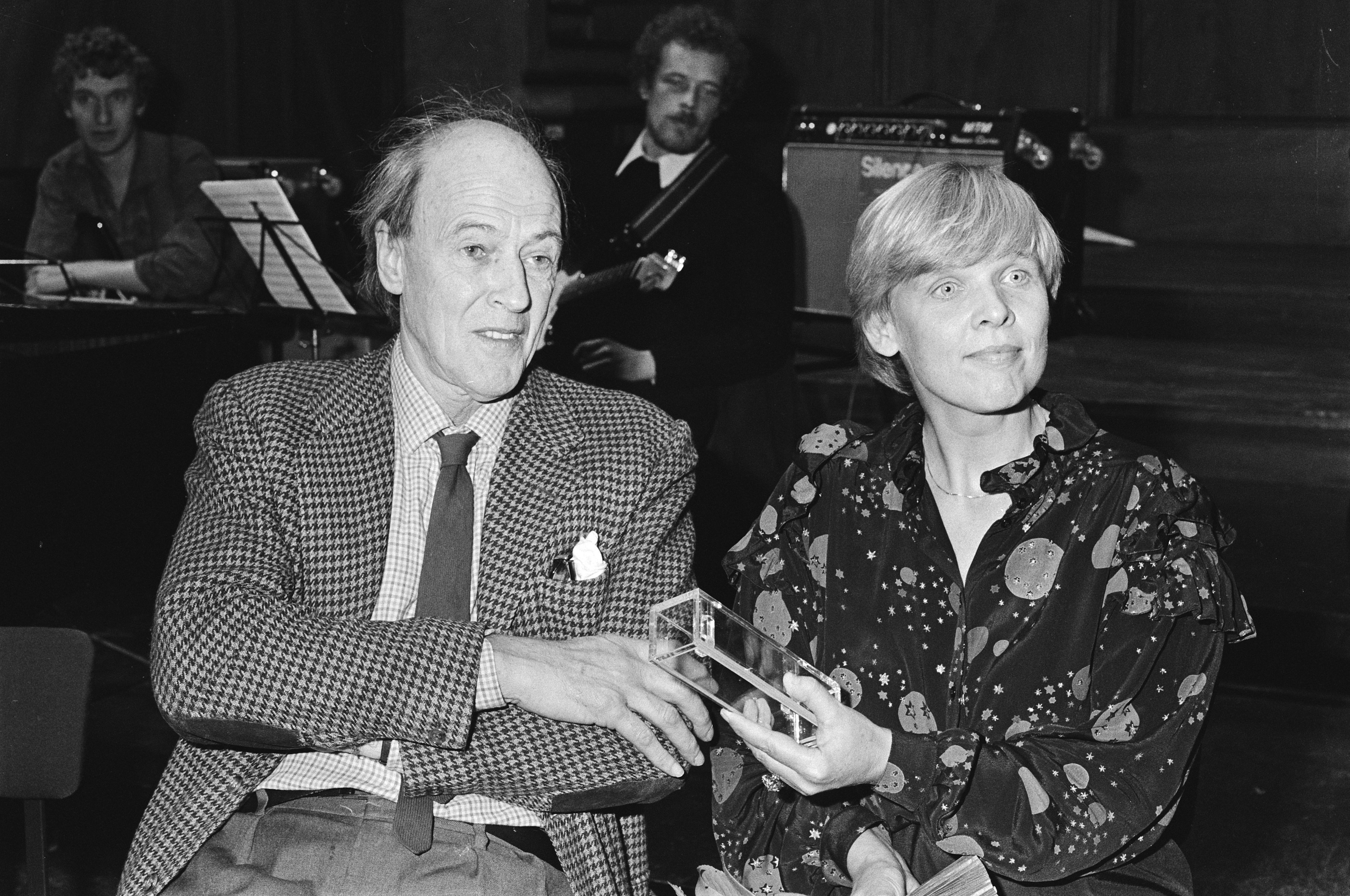 Collectie / Archief : Fotocollectie Anefo Reportage / Serie : Uitreiking Gouden Griffel en Penseel in Utrecht Beschrijving : Roald Dahl (l) en Nannie Kuiper Annotatie : Randnummers negatiefstrook: nr 3, 4, 5 Datum : 13 oktober 1982 Locatie : Utrecht (prov), Utrecht (stad) Trefwoorden : illustratoren, kinderboeken, prijzen, schrijvers, uitreikingen Persoonsnaam : Dahl, Roal, Kuiper, Nannie Fotograaf : Dijk, Hans van / Anefo Auteursrechthebbende : Nationaal Archief Materiaalsoort : Negatief (zwart/wit) Nummer archiefinventaris : bekijk toegang 2.24.01.05 Bestanddeelnummer : 932-3624